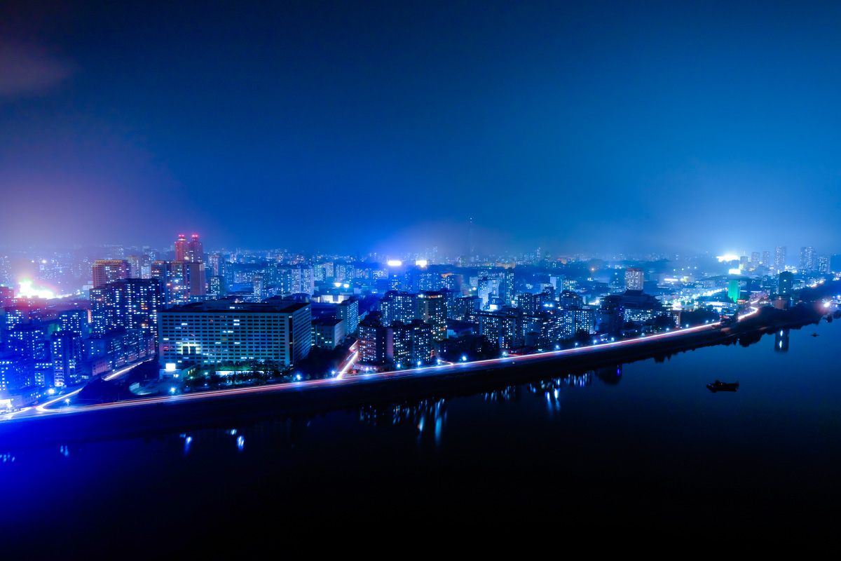 Вид на Пхеньян ночью